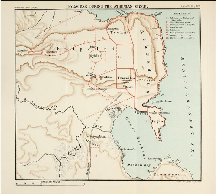 Mappa di Siracusa all'epoca dell'assedio ateniese